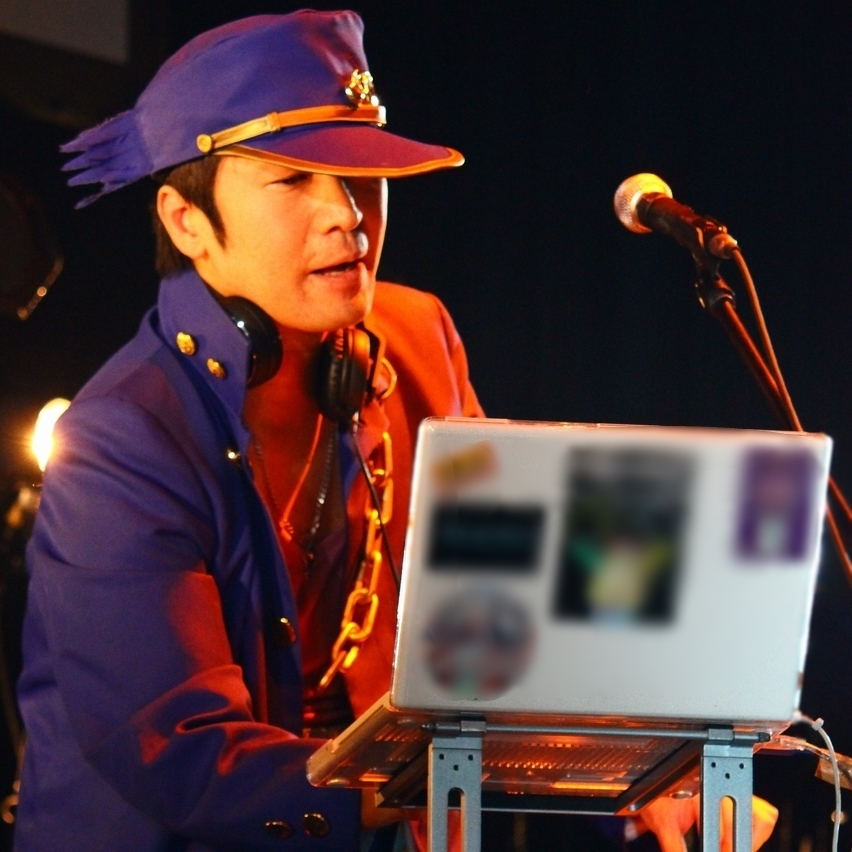 2014年マイナビBLITZ赤坂